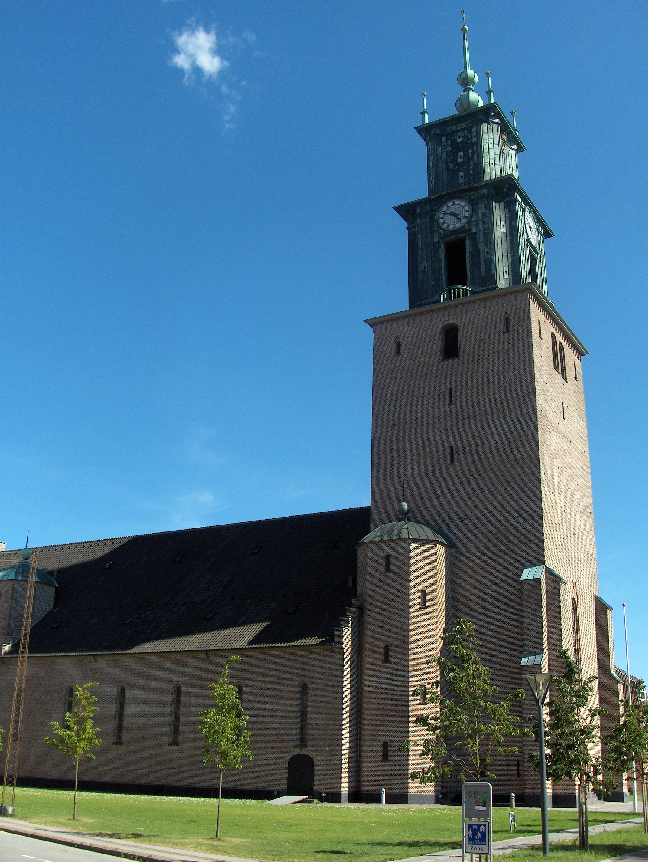 Sankt Markus Kirke i Aalborg